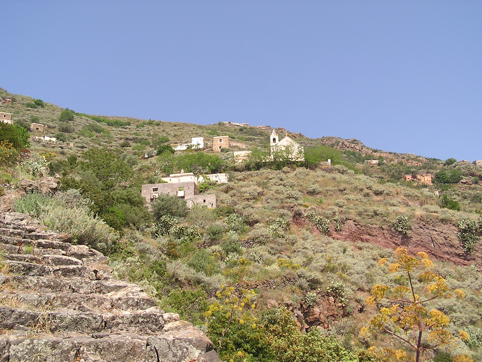 Alicudi, opuštěné budovy